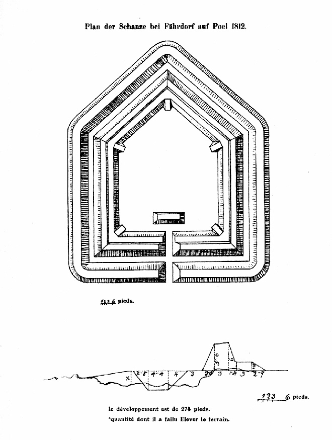 Plan der Fährdorfer Schanze zu Zeiten der Kontinentalsperre